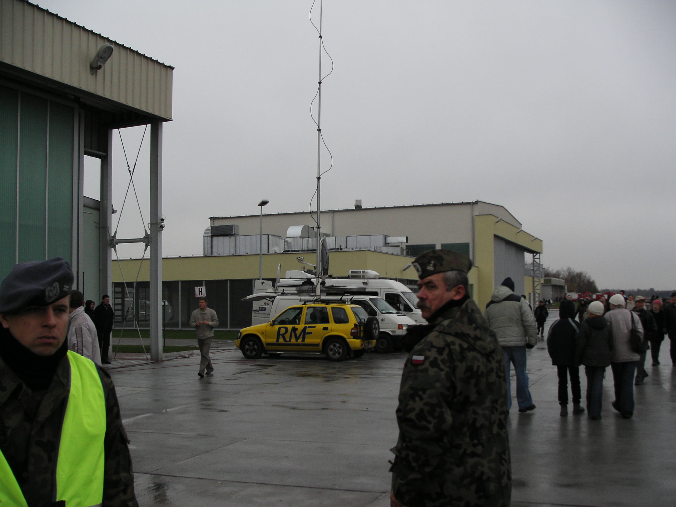 Woz reporterski RMF FM, lotnisko Krzesiny, powitanie F16.